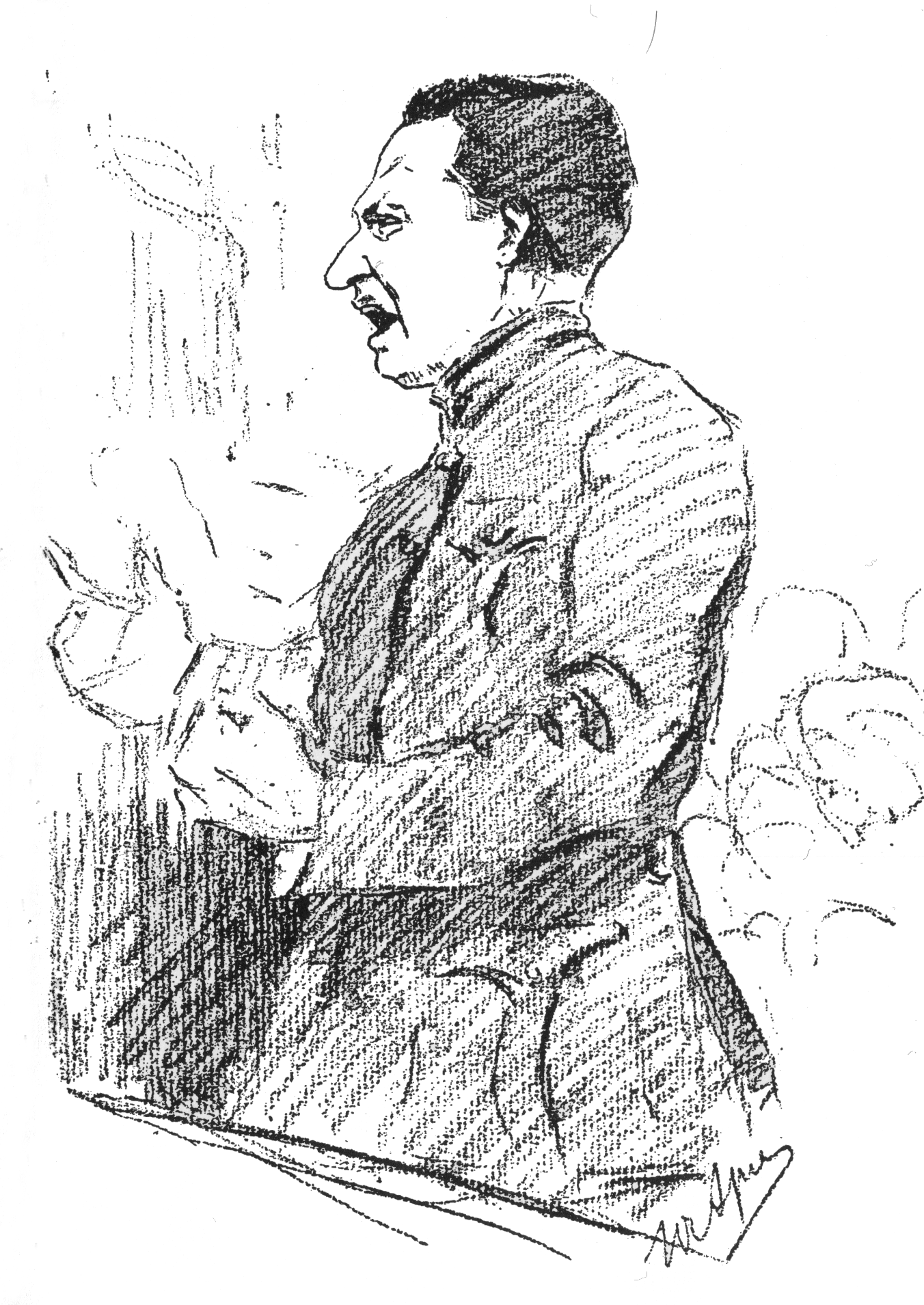 Aleksandr Kérenski en la Conferencia Estatal de Moscú (del 25-08-1917 al 28-08-1917), por Yury Artsybushev.